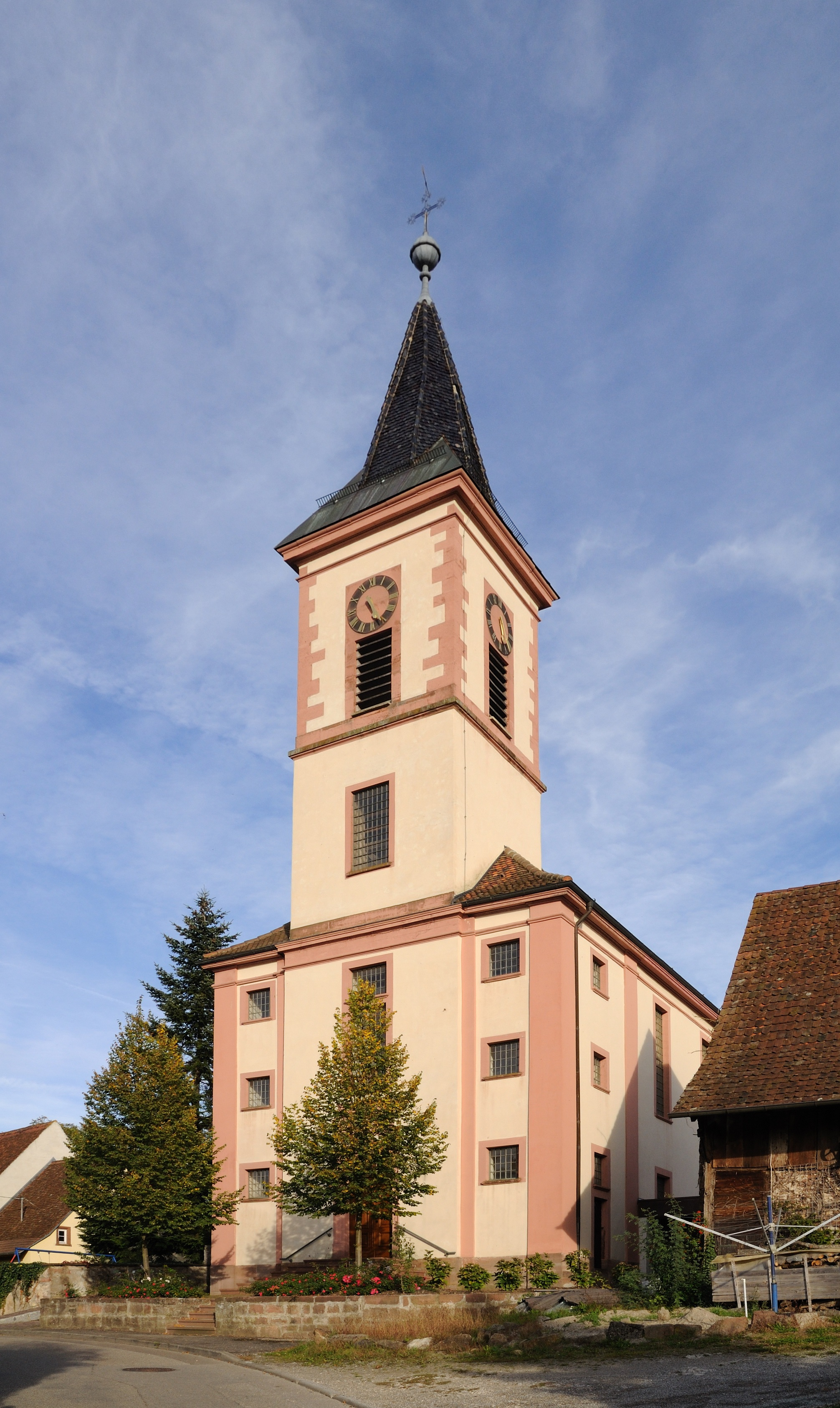 Wittlingen: St. Michael, Turmseite